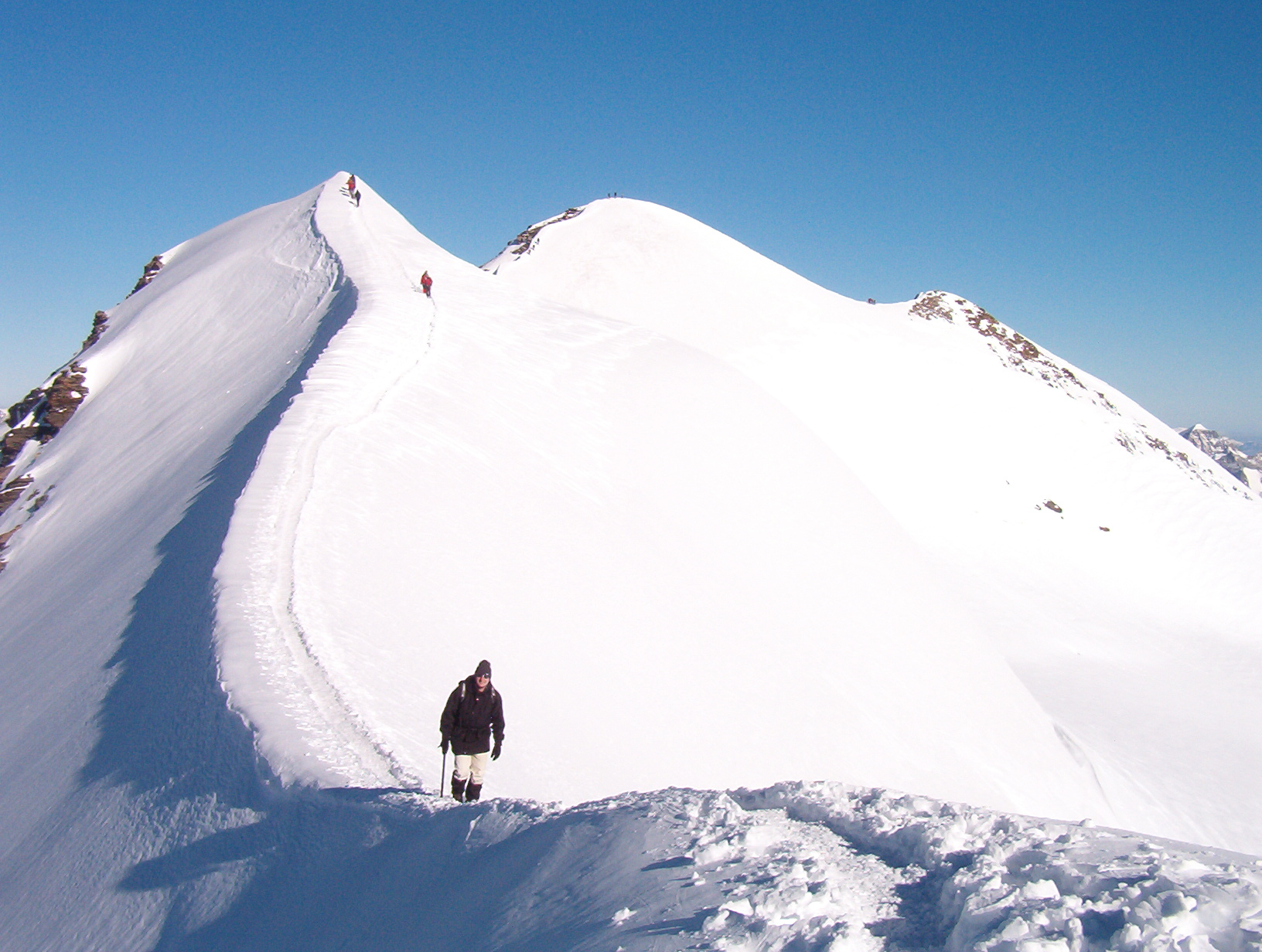 Salita al monte Castore per la cresta sudorientale - Alpi Pennine